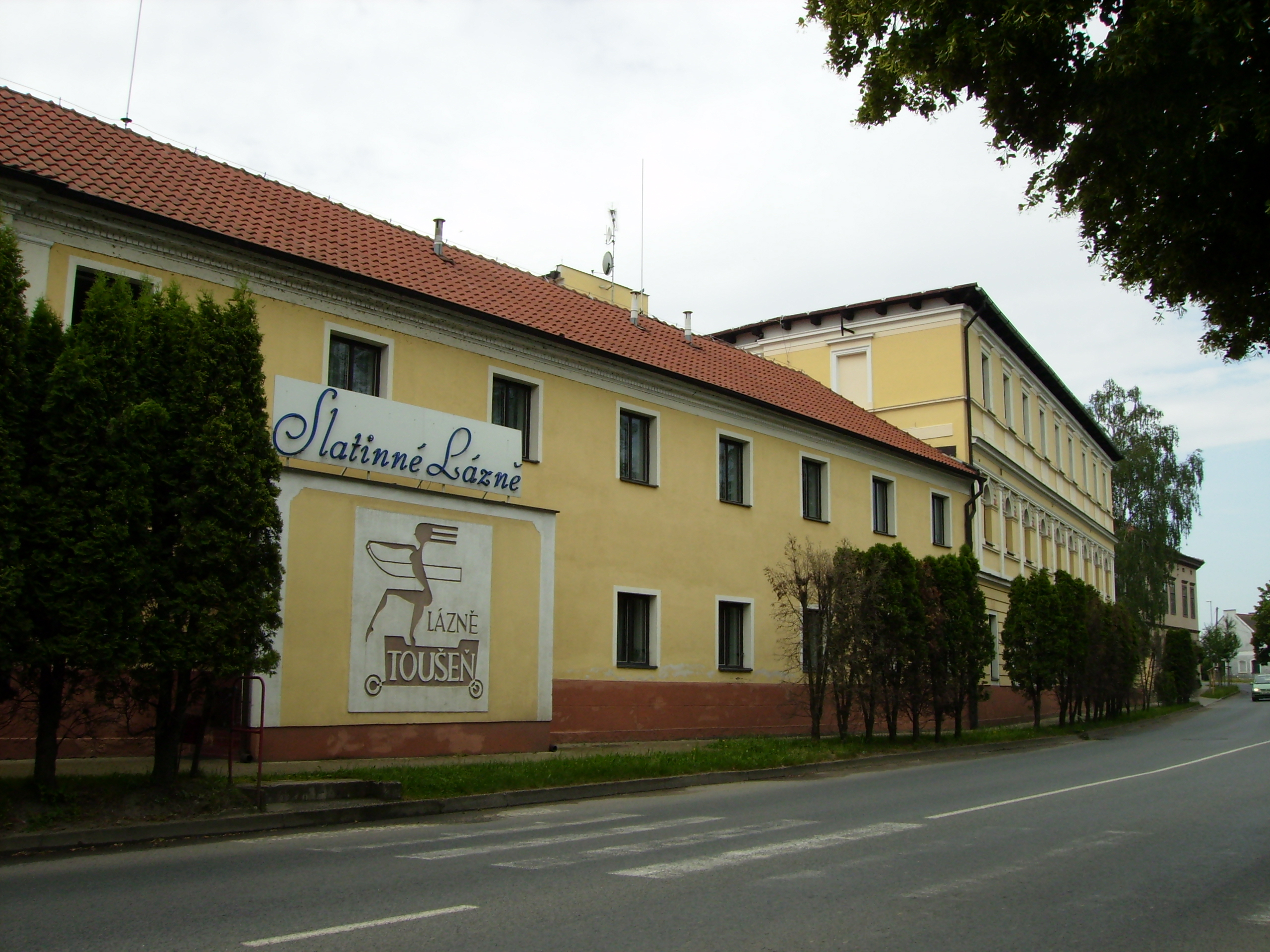 Lázně Toušeň - slatinné lázně.